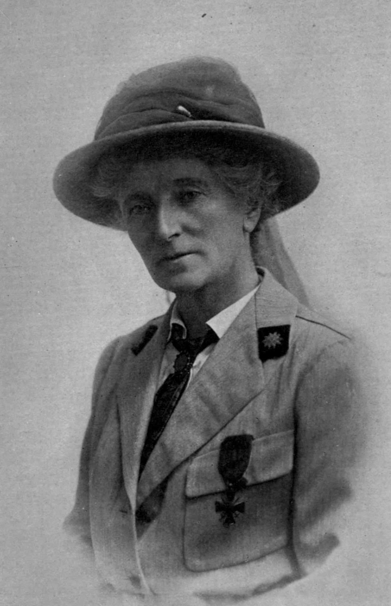 MRS. KATHERINE M. HARLEY OF LONDON